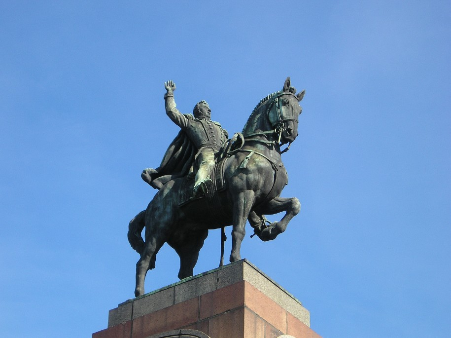 Monumento al Gral. Carlos M. de Alvear, Antoine Bourdelle, en Plaza Francia, Recoleta, Buenos Aires, Argentina